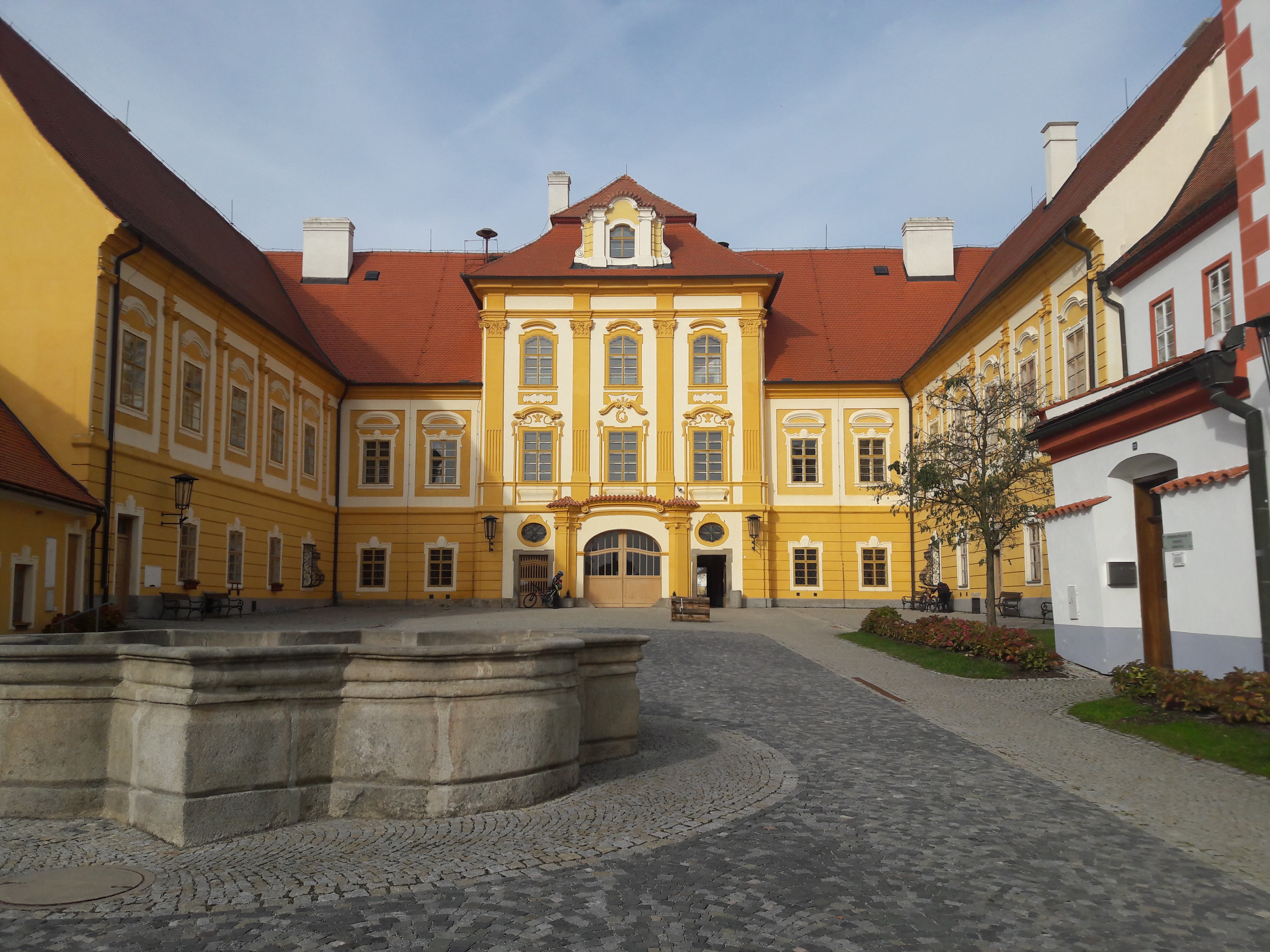 klášter